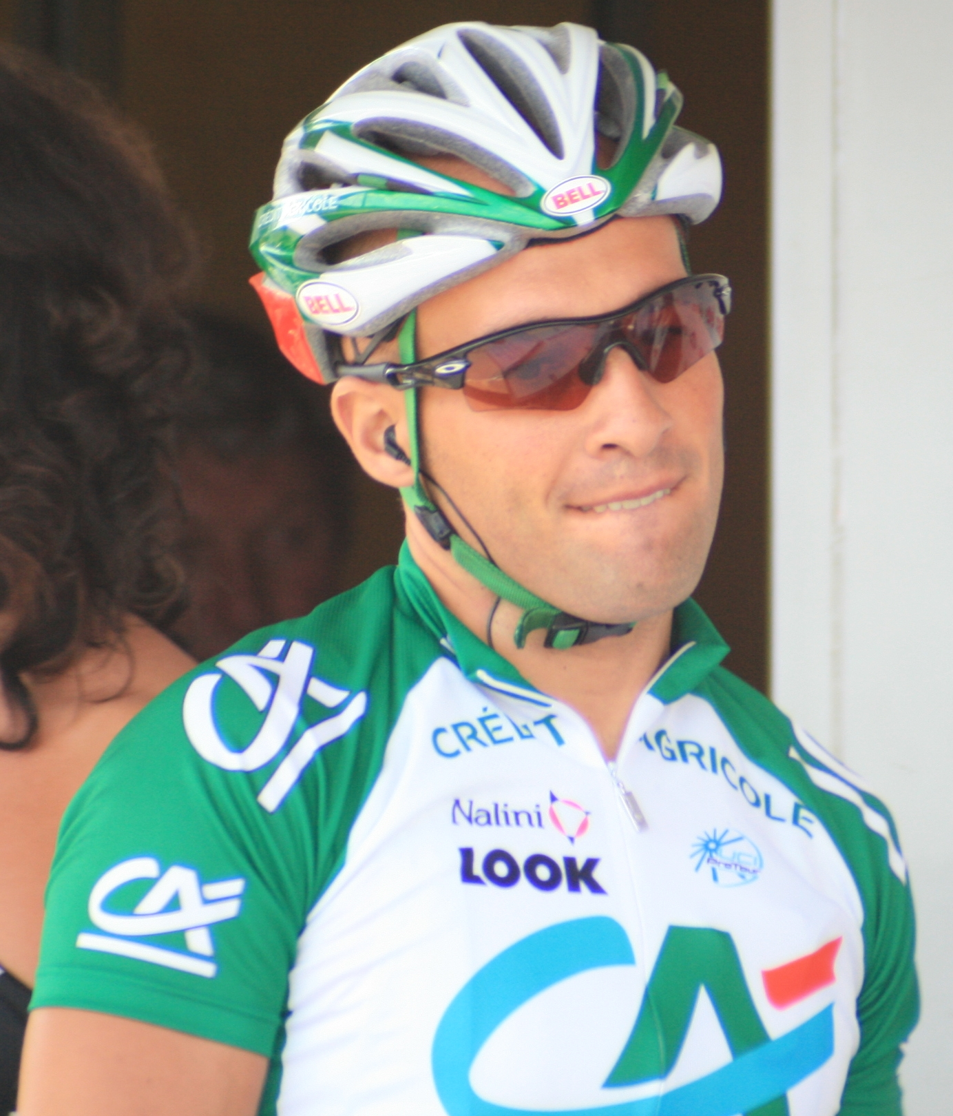 Angelo Furlan, à l'Eneco Tour 2008, à Ardooie